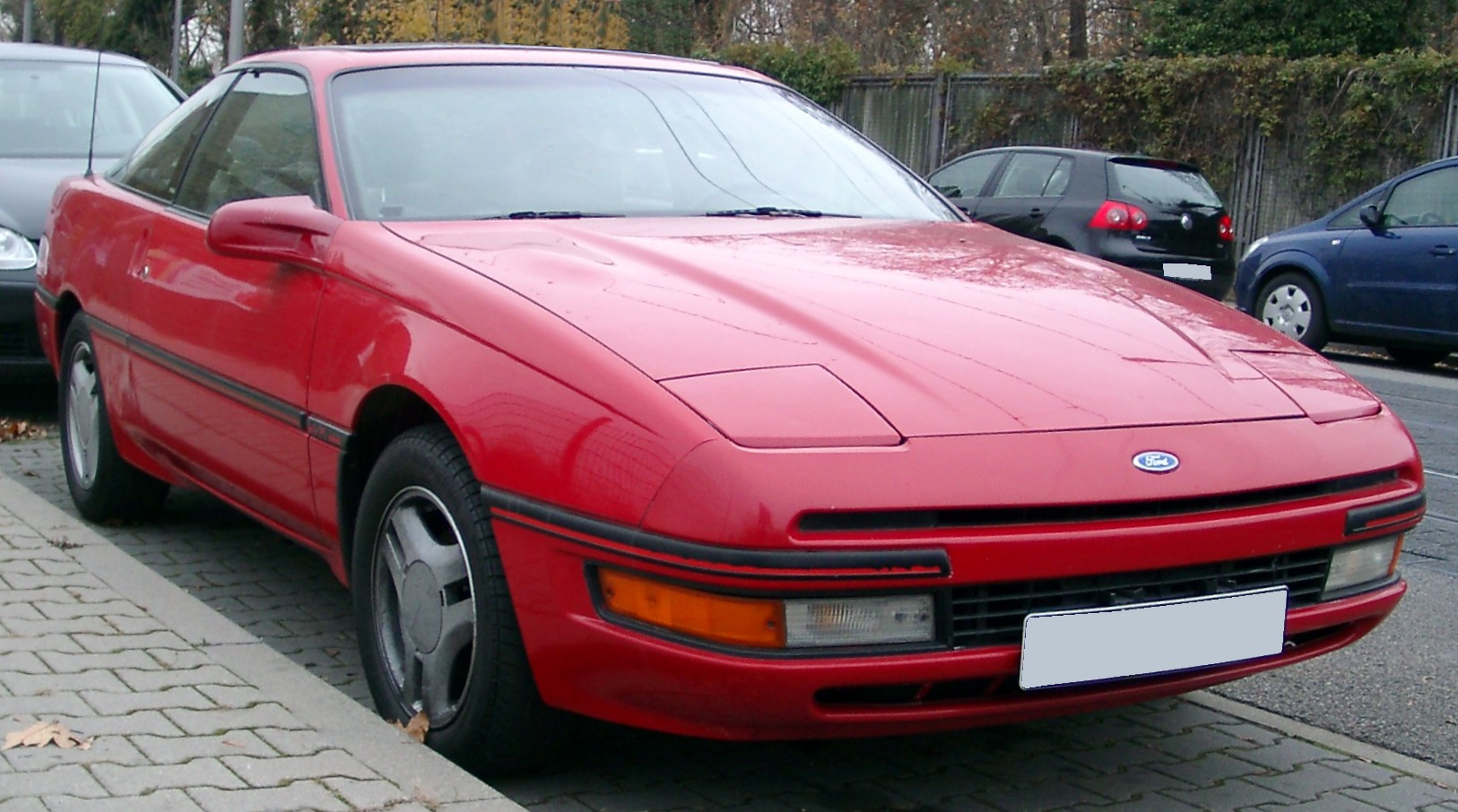 Ford Probe, 1. Generation